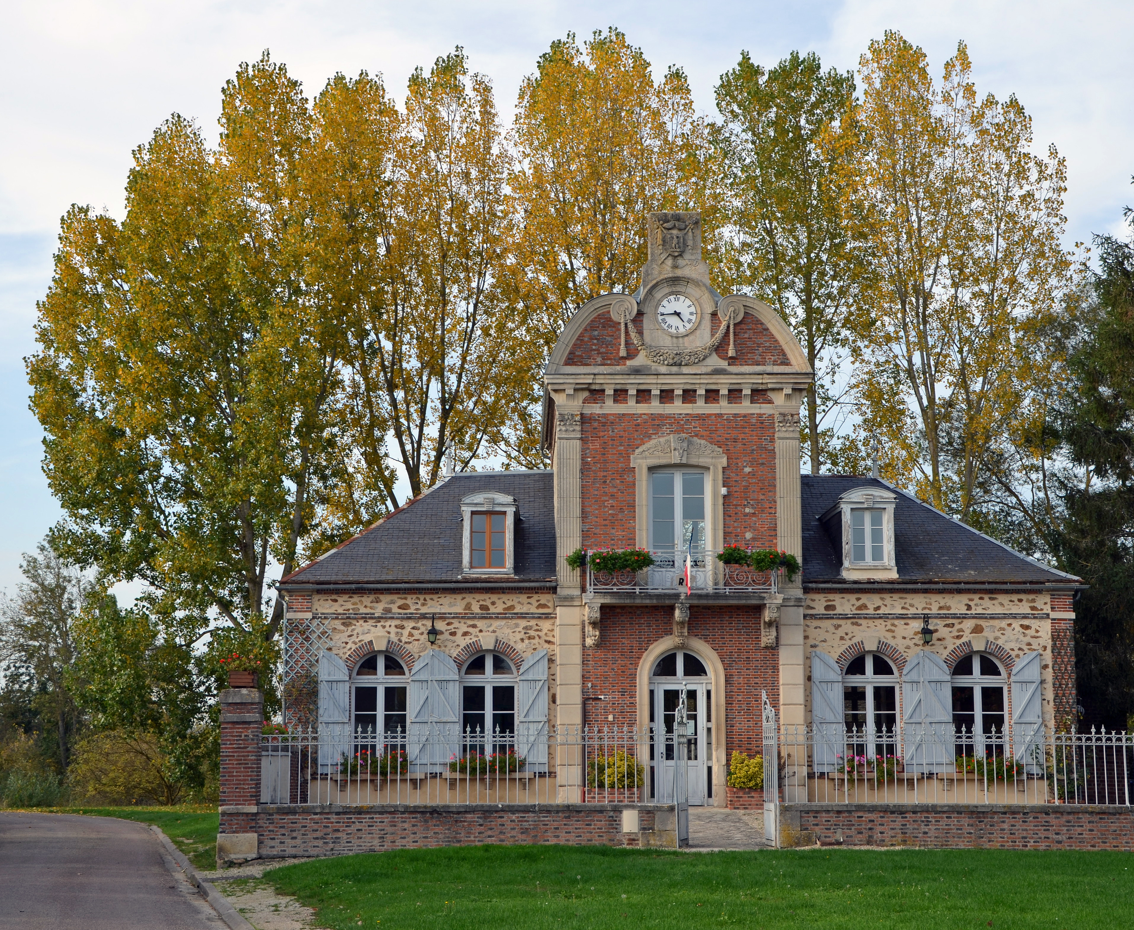 Mairie de Courceroy, Aube, Champagne-Ardennes, France